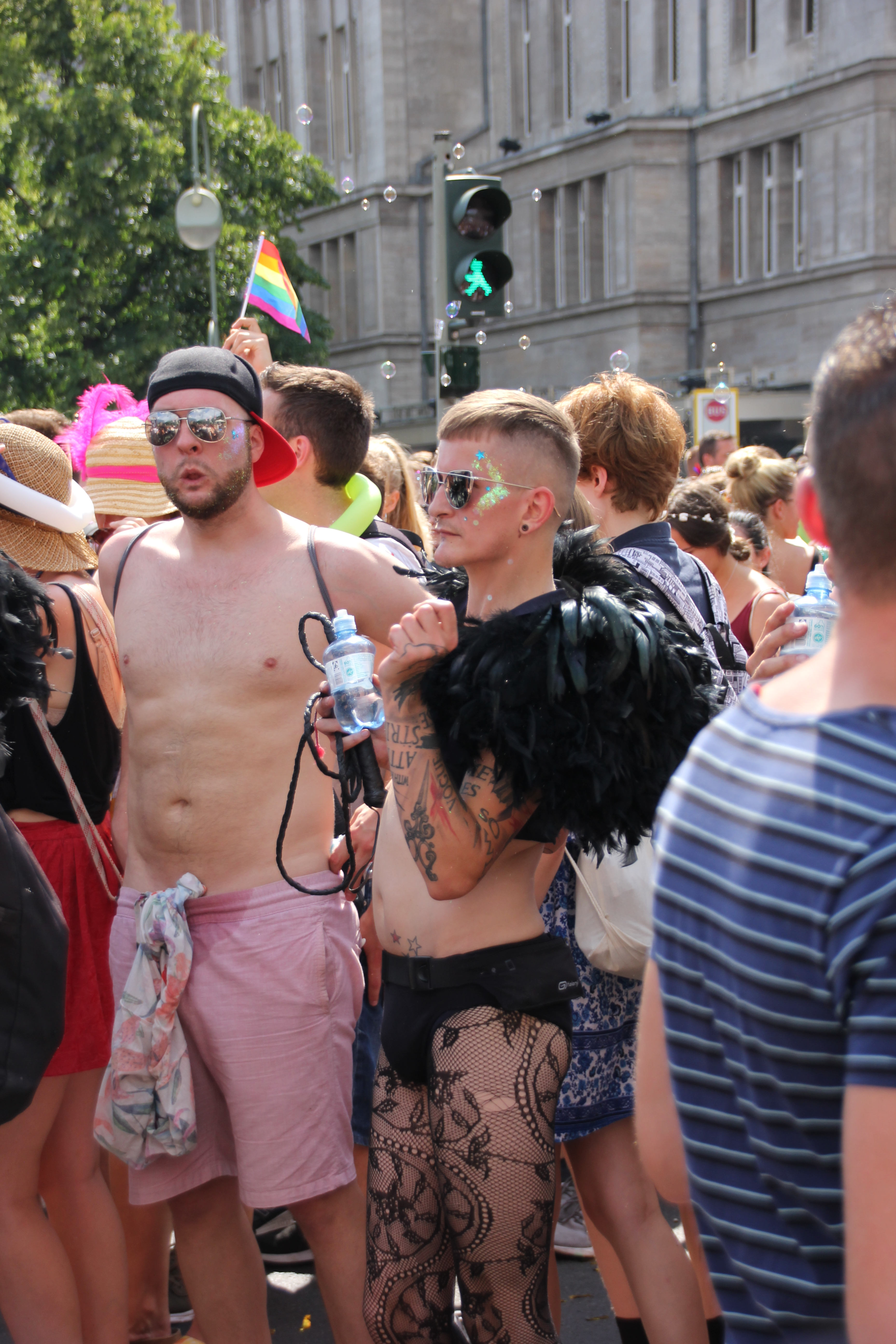 CSD Berlin 2018